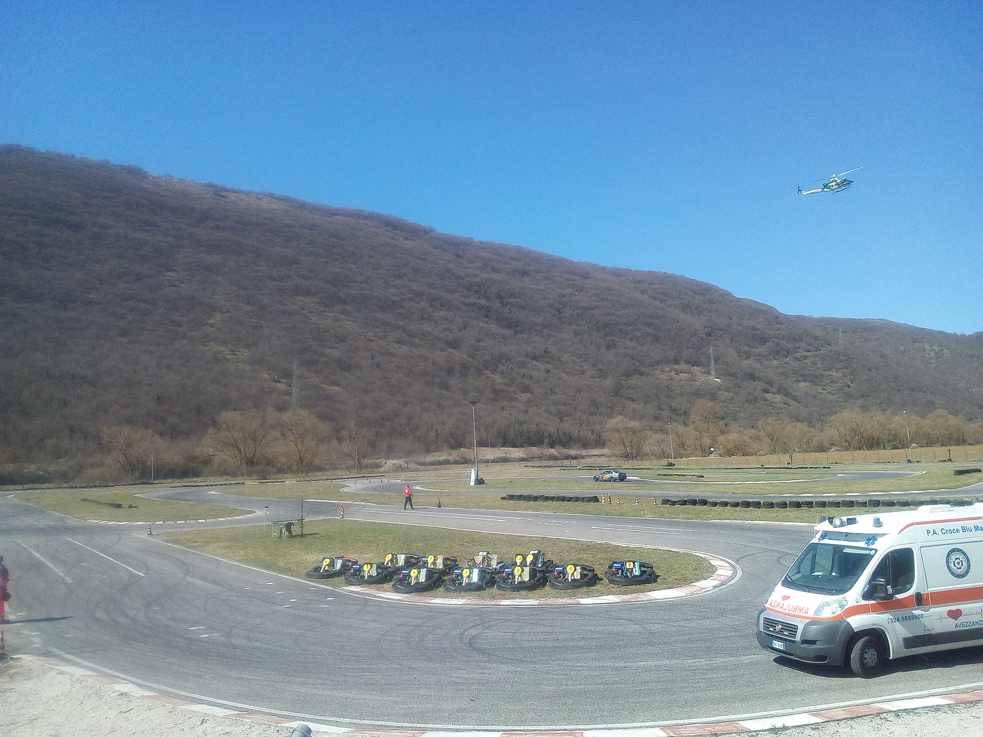 Drifting automobilistico a Magliano de' Marsi